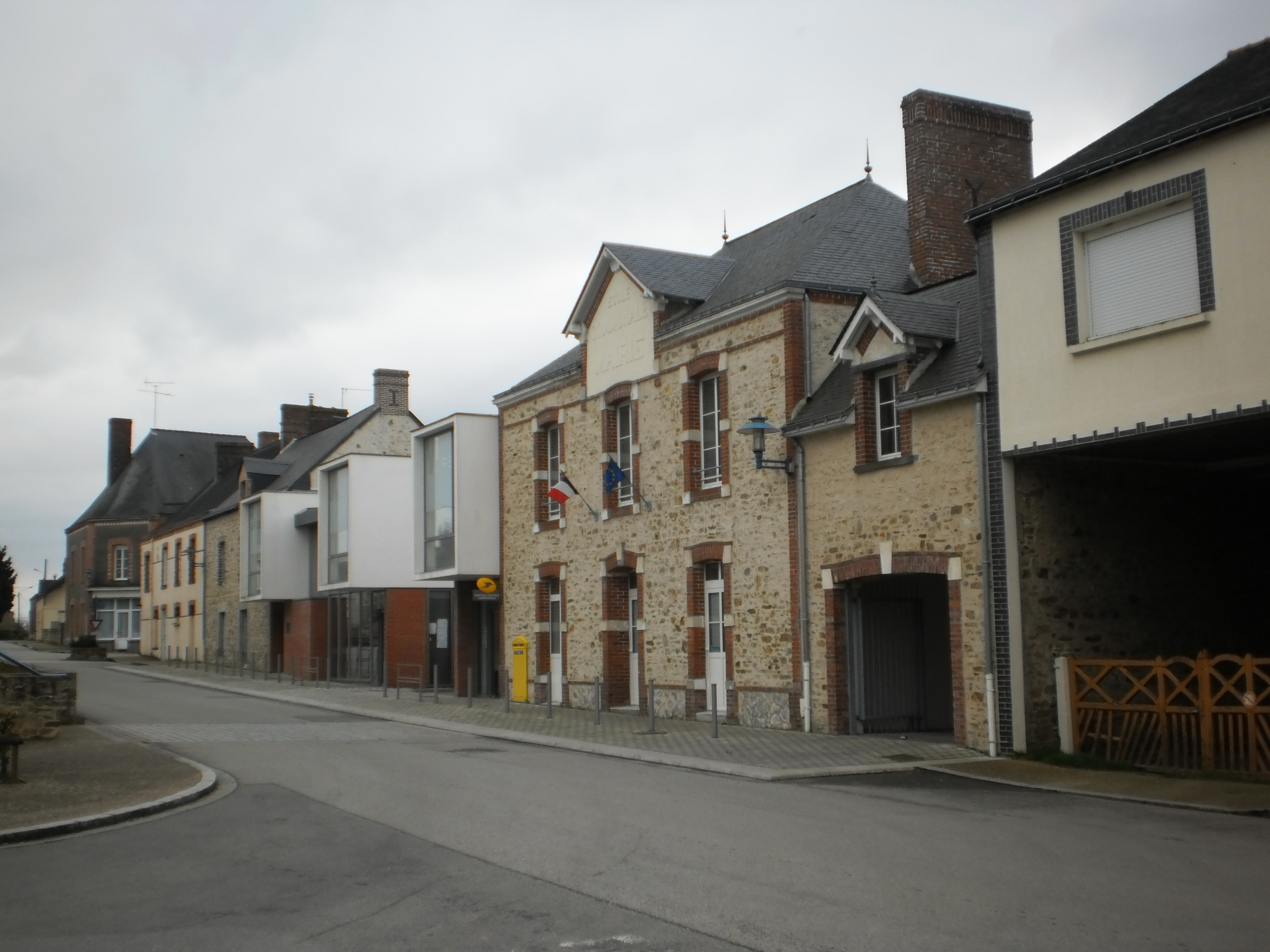 Villepot (Loire-Atlantique, France) : mairie